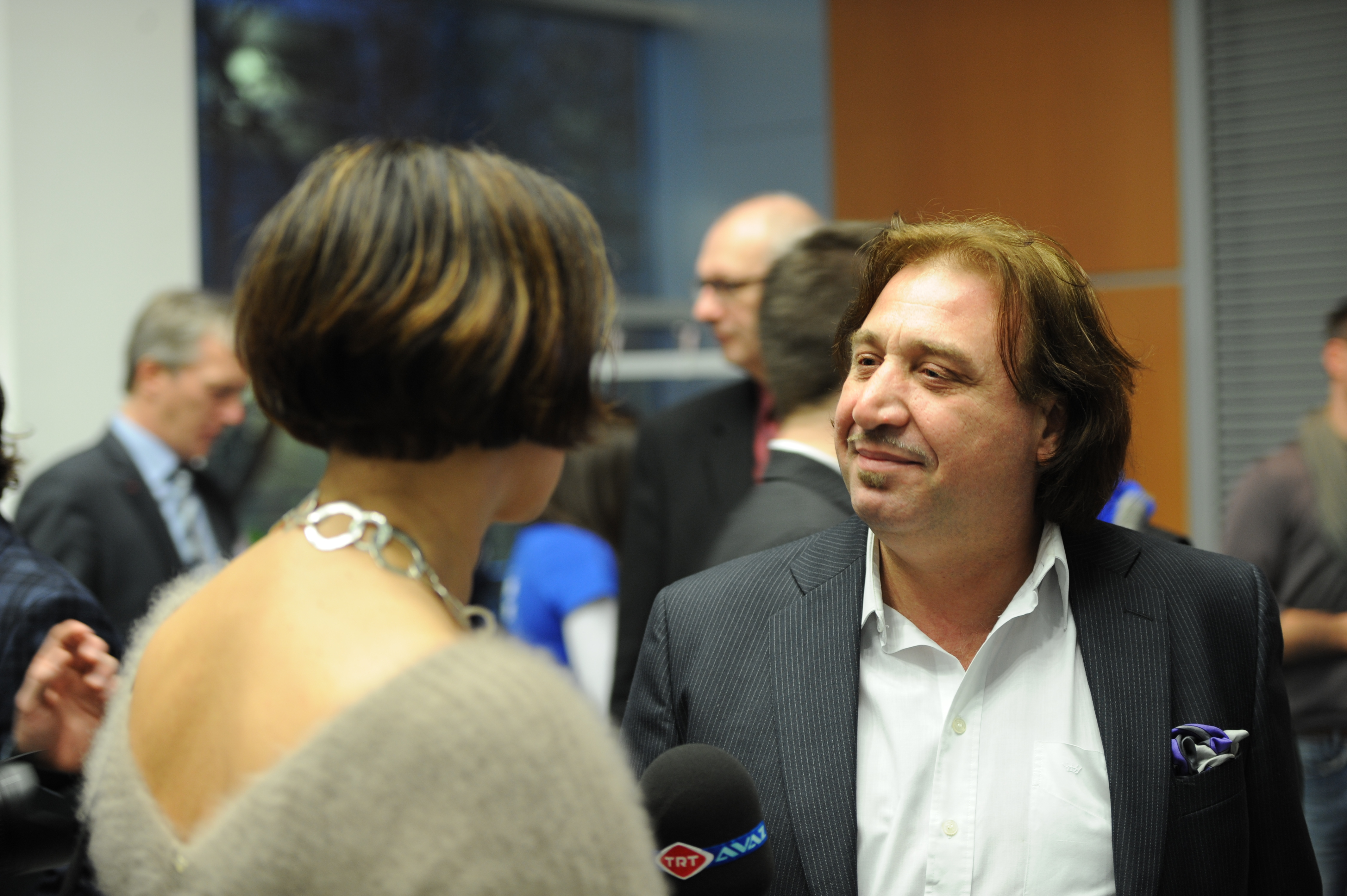 Landtagswahl in Niederösterreich am 3. März 2013: TRT-Interview mit Johanna Mikl-Leitner